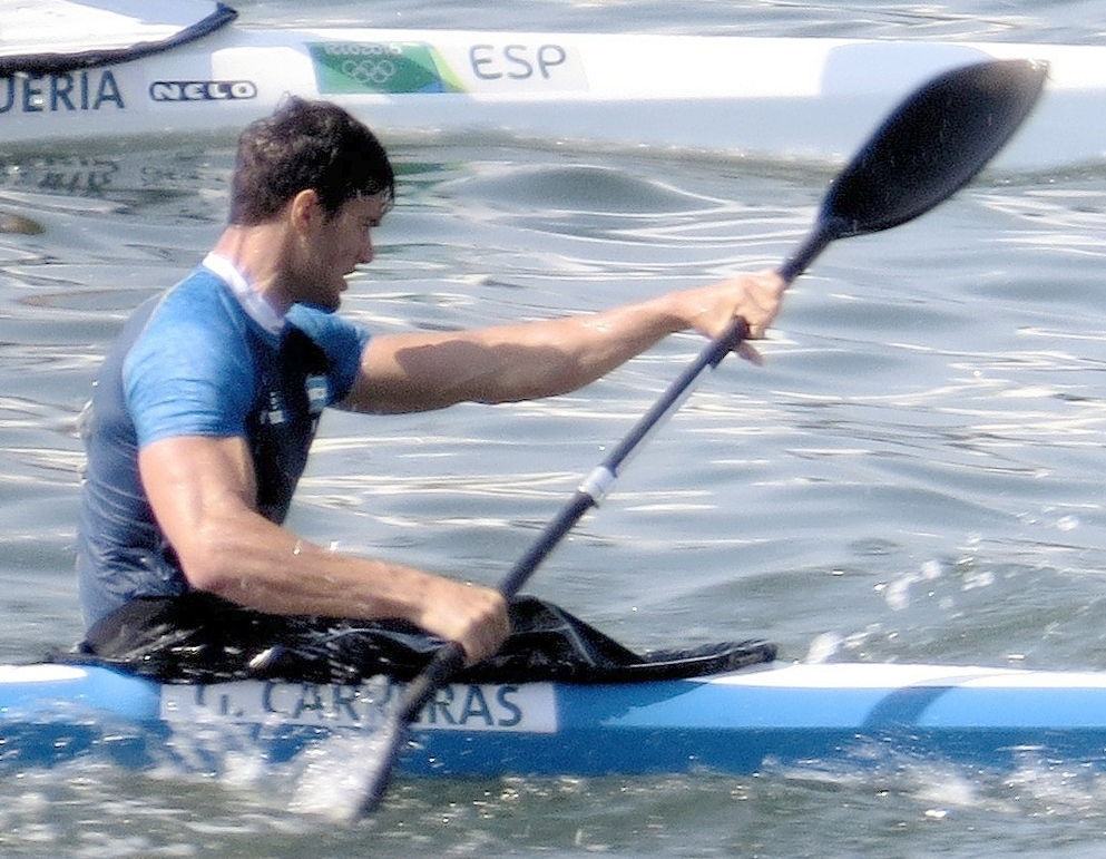 Sx50